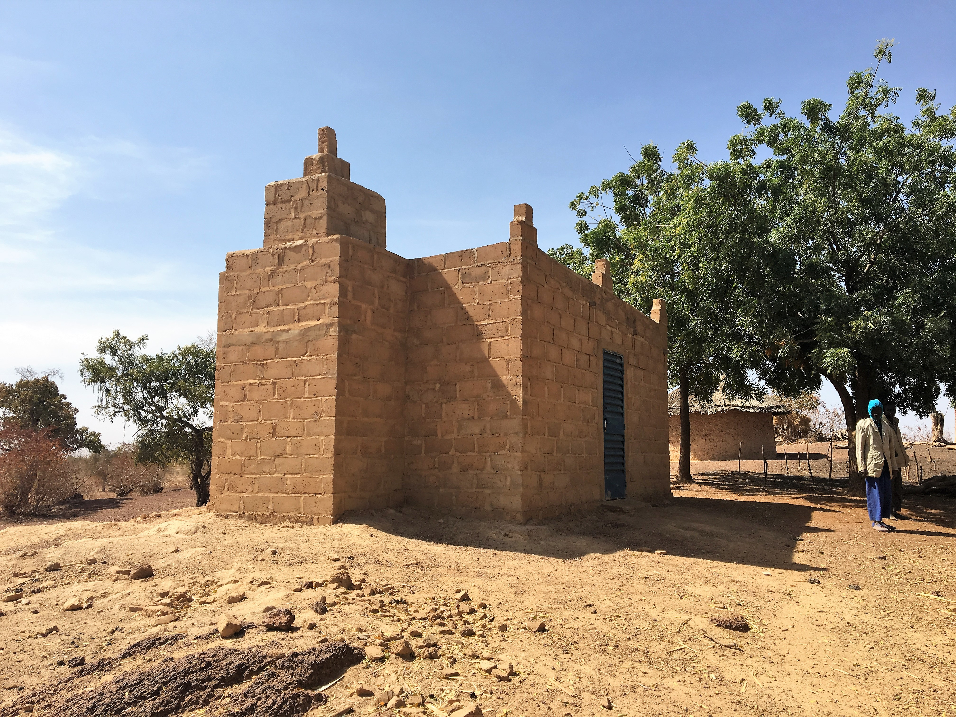 Mosquée de Bogonam Peulh